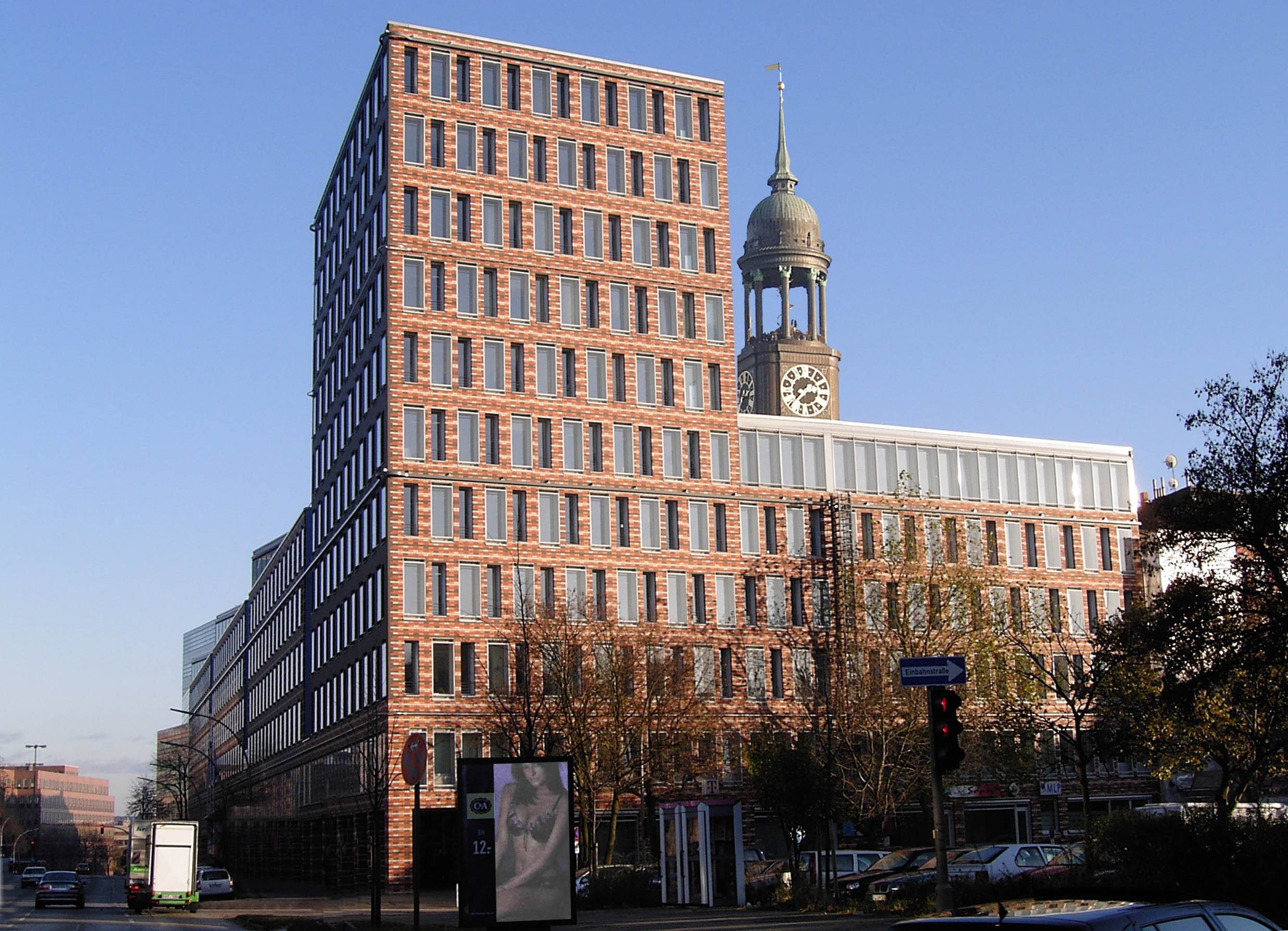 KPMG Building in Hamburg, architect Otto Steidle